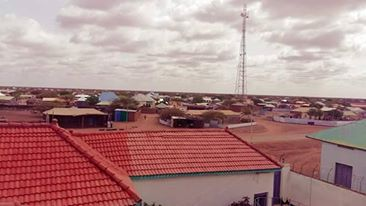 Soomaaliga: Maabaan1 waxaa qaaday oday guriceel